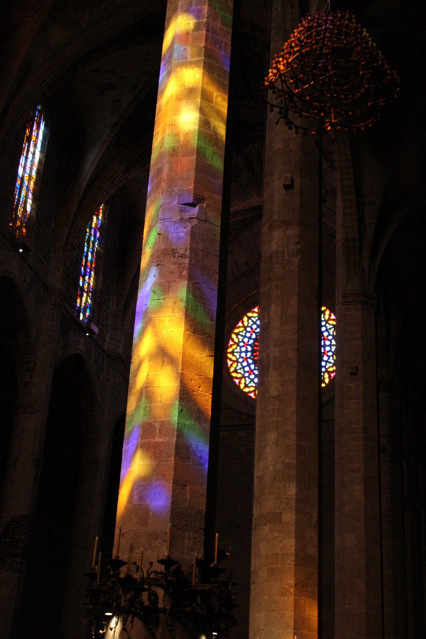 Catedral de Santa María de Palma de Mallorca